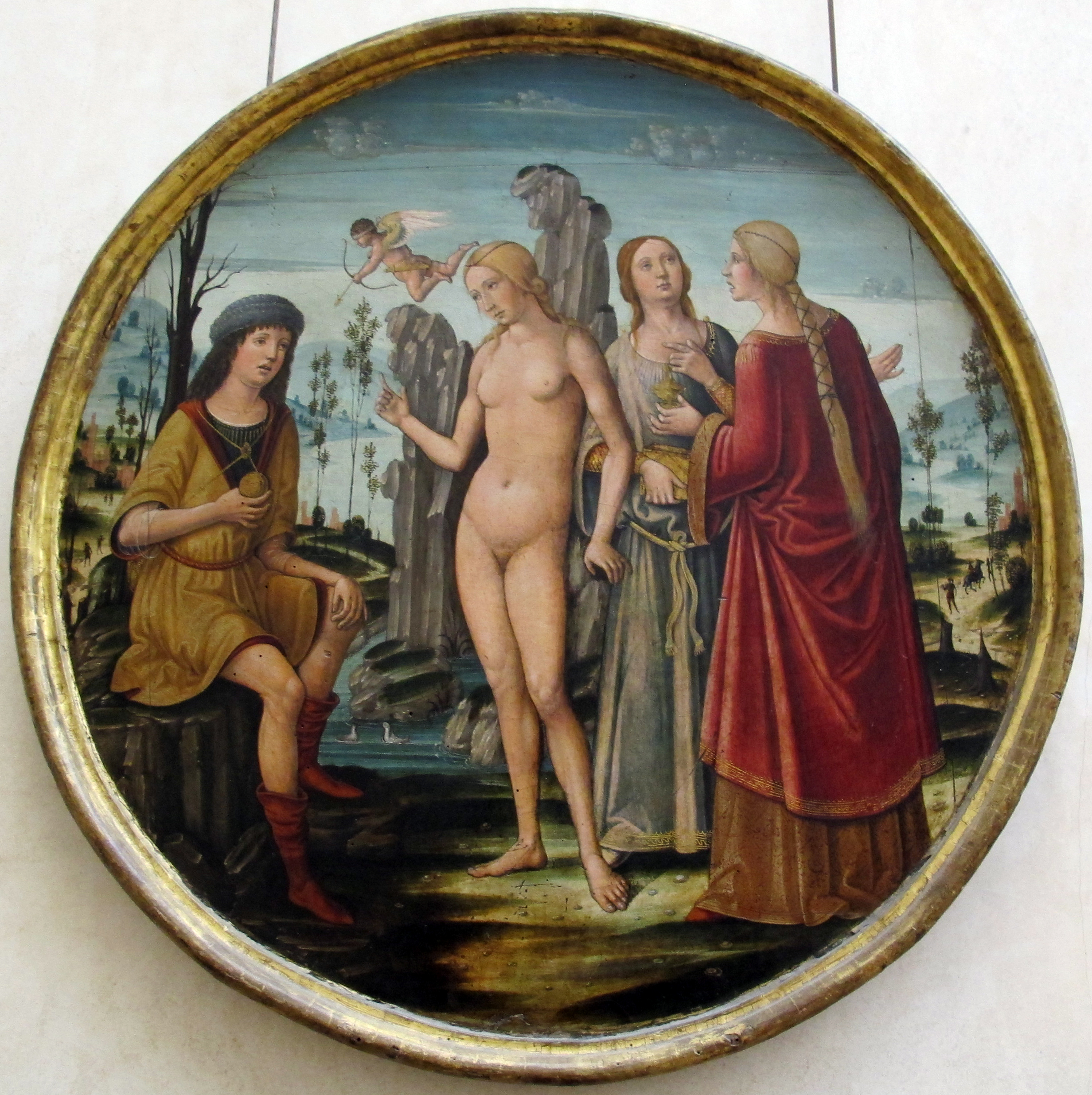 Pittura italiana del Quattrocento al Louvre, Parigi